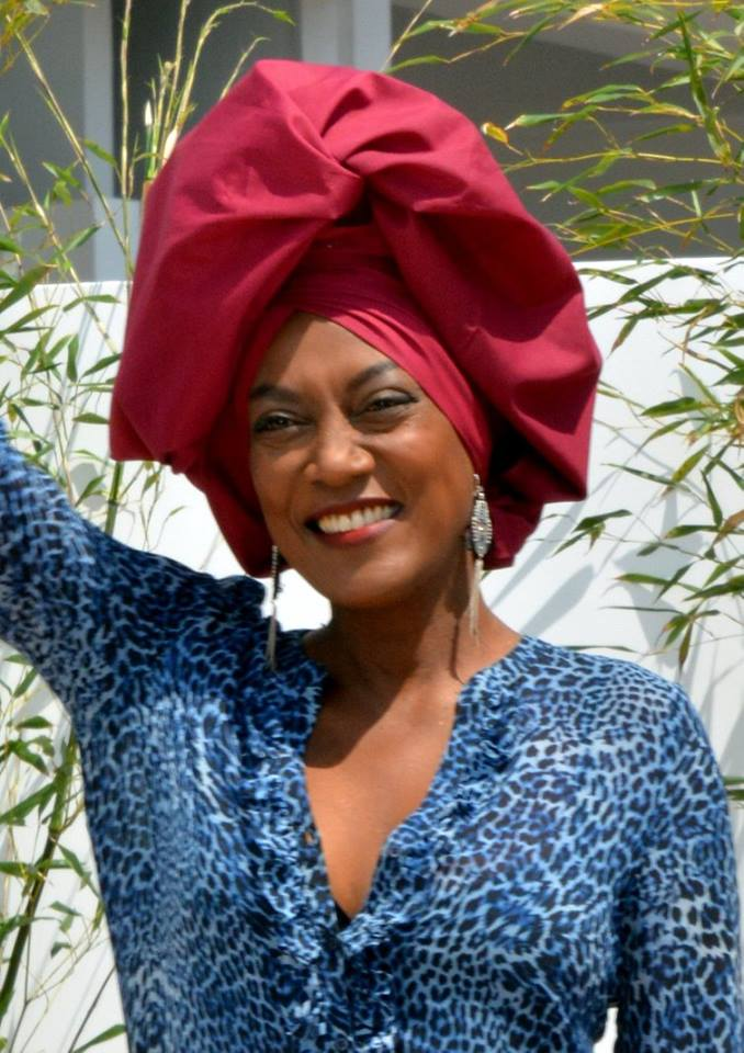 Khadja Nin au festival de Cannes